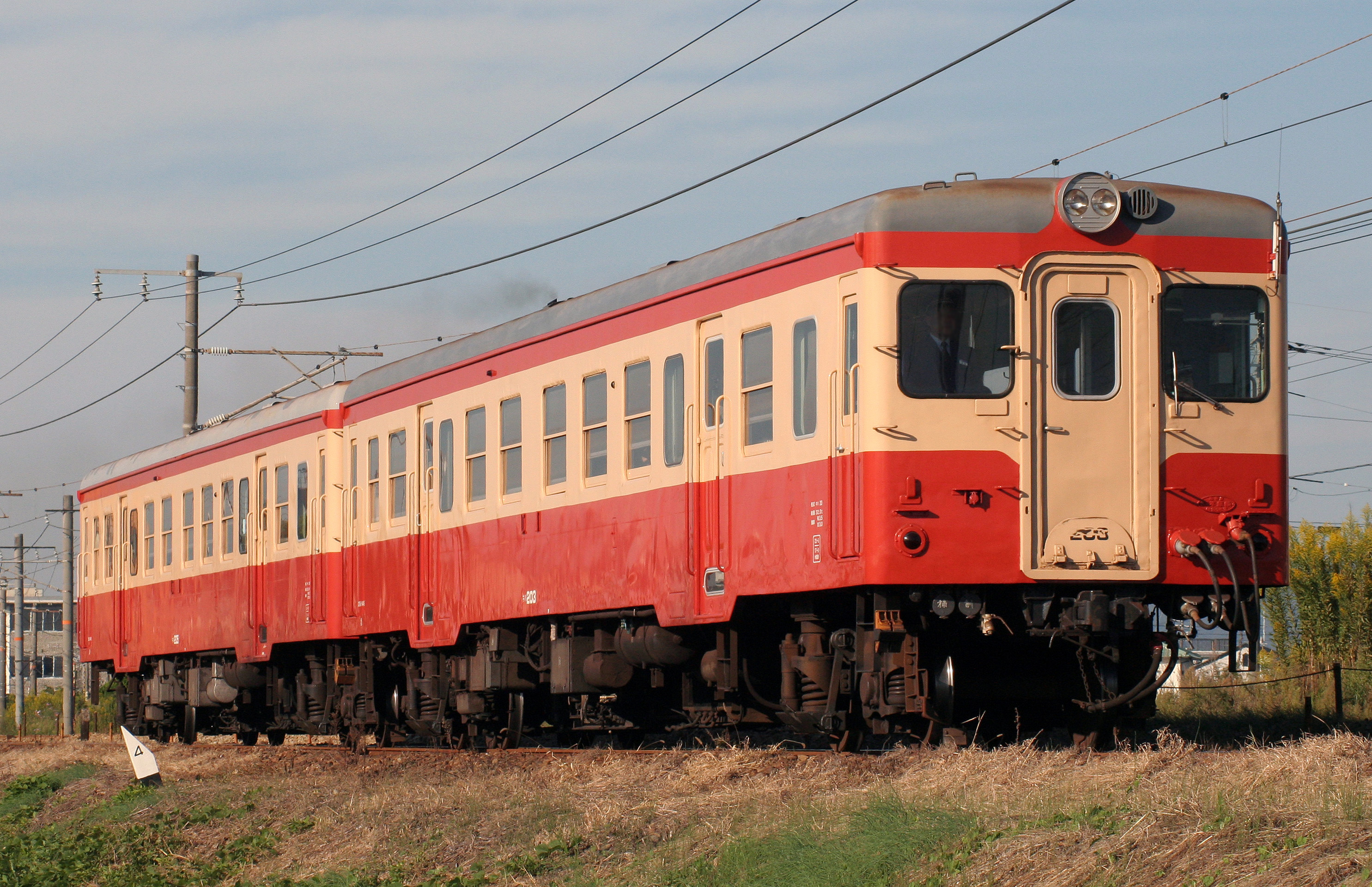 水島臨海鉄道キハ20形気動車203･205 2両編成